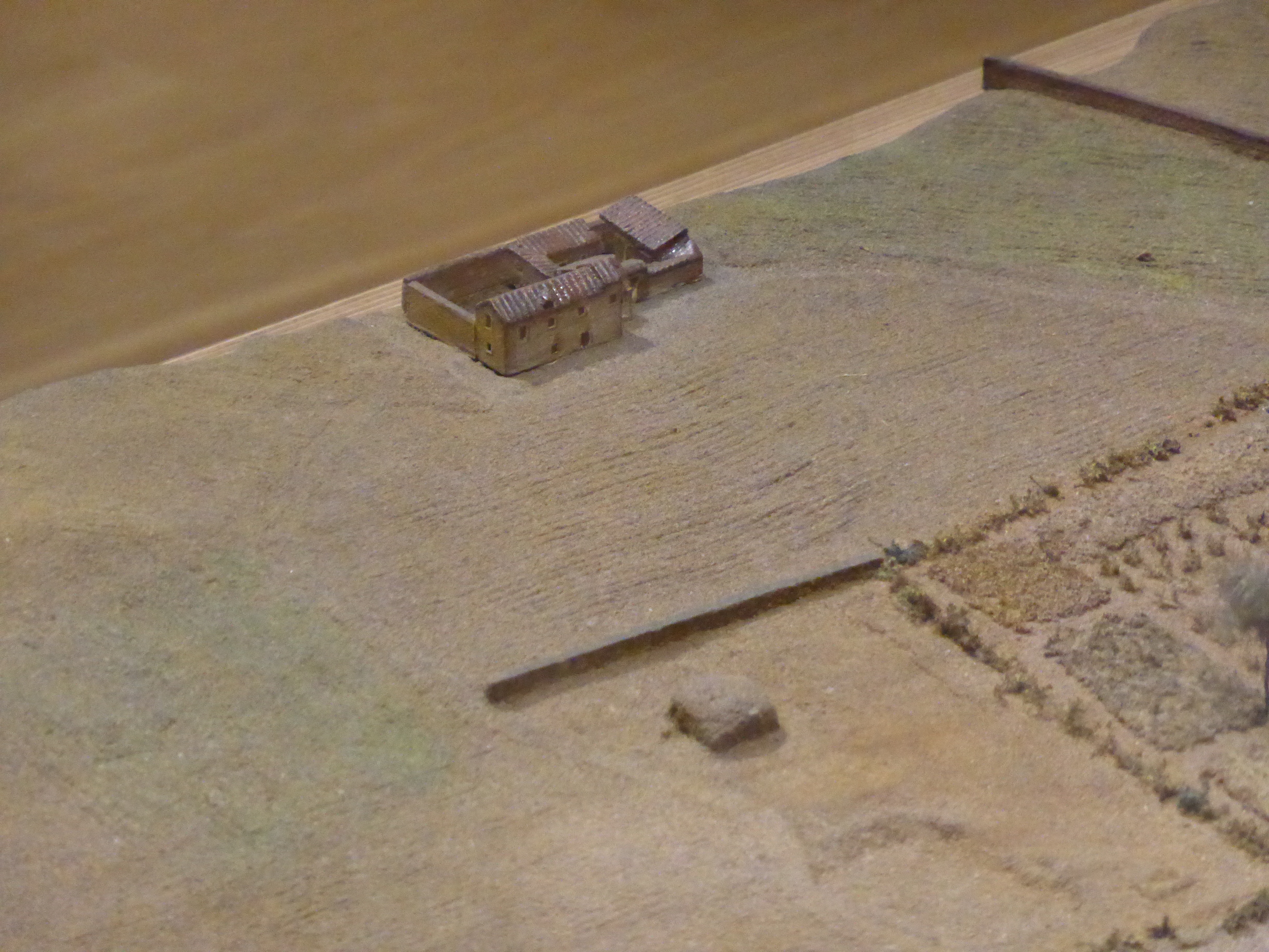 La gran maqueta o "Modelo de Madrid" que conserva el Museo Municipal (actualmente llamado "Museo de Historia de Madrid"), incluye la casa donde residió Francisco de Goya, en la Quinta del Sordo, cerca del puente de Segovia. Esta maqueta fue realizada por el ingeniero militar León Gil de Palacio, entre los años 1828 y 1830. En esta última casa de Goya en Madrid, entre los años 1819 y 1823, creó las Pinturas Negras. Dichas pinturas eran murales, al óleo sobre yeso. En el siglo XIX se las llamó pinturas al fresco, como sinónimo de pinturas murales. La revista española "Descubrir el Arte", en su número 201, de noviembre de 2015, publica un dosier "Especial Goya" donde se identifica la casa por primera vez. Es la verdadera casa de campo de Goya, con aspecto rural, antes de que sus descendientes construyesen al lado un palacete burgués (que hasta ahora se había creído erróneamente que era la casa de Goya). En realidad el pintor solamente conoció la casa que se ve en la maqueta. Su casa tenía dos plantas, y las Pinturas Negras se encontraban en el lado sur (a la izquierda de la fachada principal).